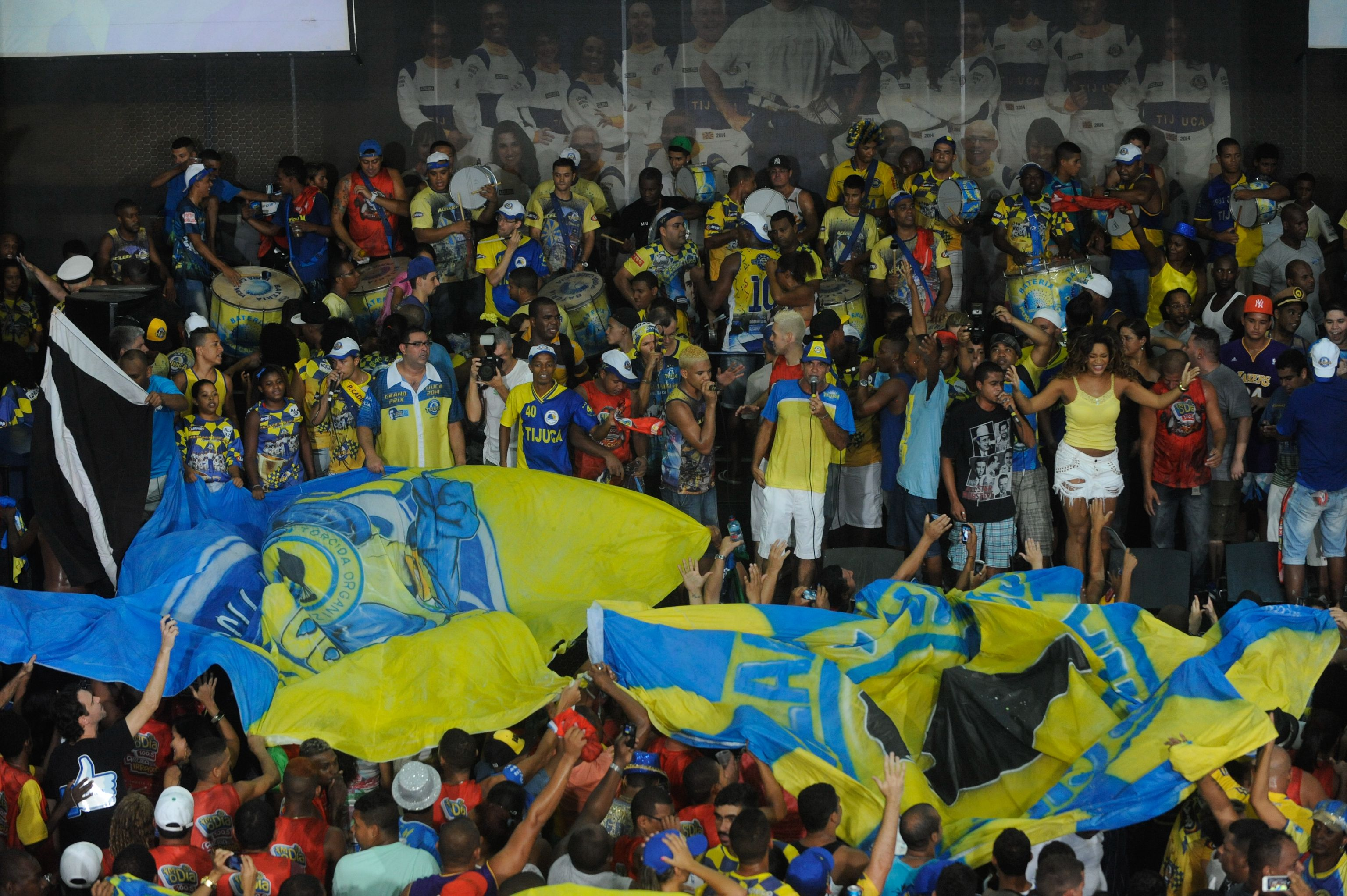 Rio de Janeiro - Comunidade lota a quadra da Unidos da Tijuca para comemorar título de vencedora do carnaval 2014 (Fernando Frazão/Agência Brasil)